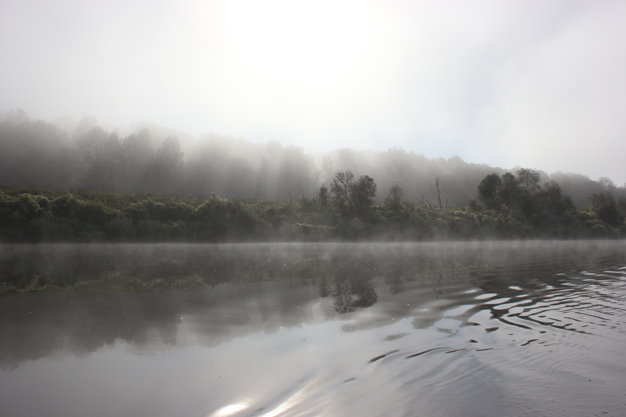 Утренний туман словно поглотил все краски, оставив лишь игру света и тени. This image is related to the protected area of Russia number 4000001